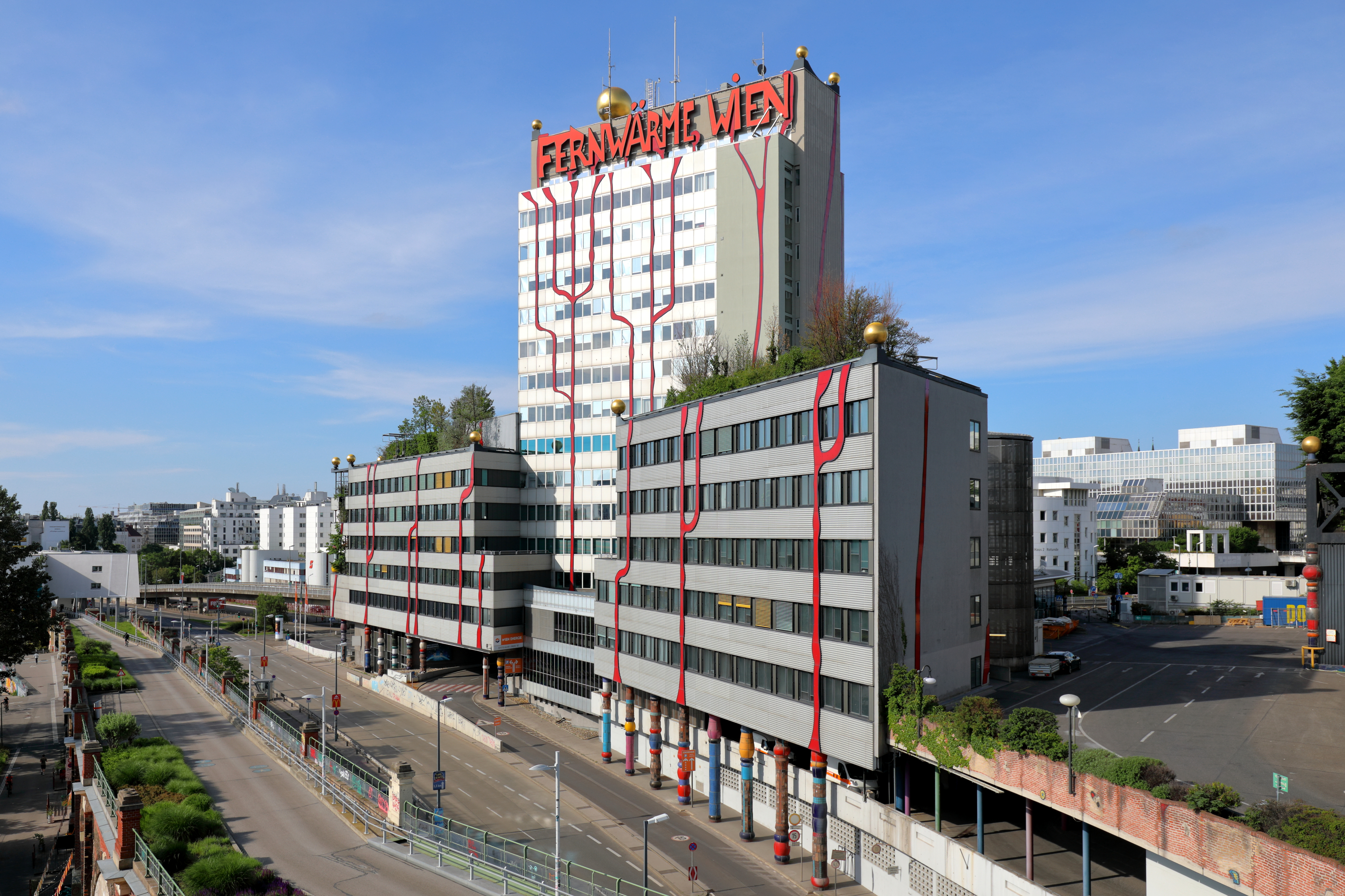 Nordansicht des Verwaltungsgebäude der Fernwärme Wien (Wien Energie AG) an der Adresse Spittelauer Lände 45 in der Spittelau, ein Ortsteil im 9. Wiener Gemeindebezirk Alsergrund.Am 15. Mai 1987 brannte die Müllverbrennungsanlage ab. Im Zuge des Wiederaufbaues wurde der Künstler Friedensreich Hundertwasser um 88 Mio. Schilling beauftragt, die Fassade und den Schlot zu gestalten.